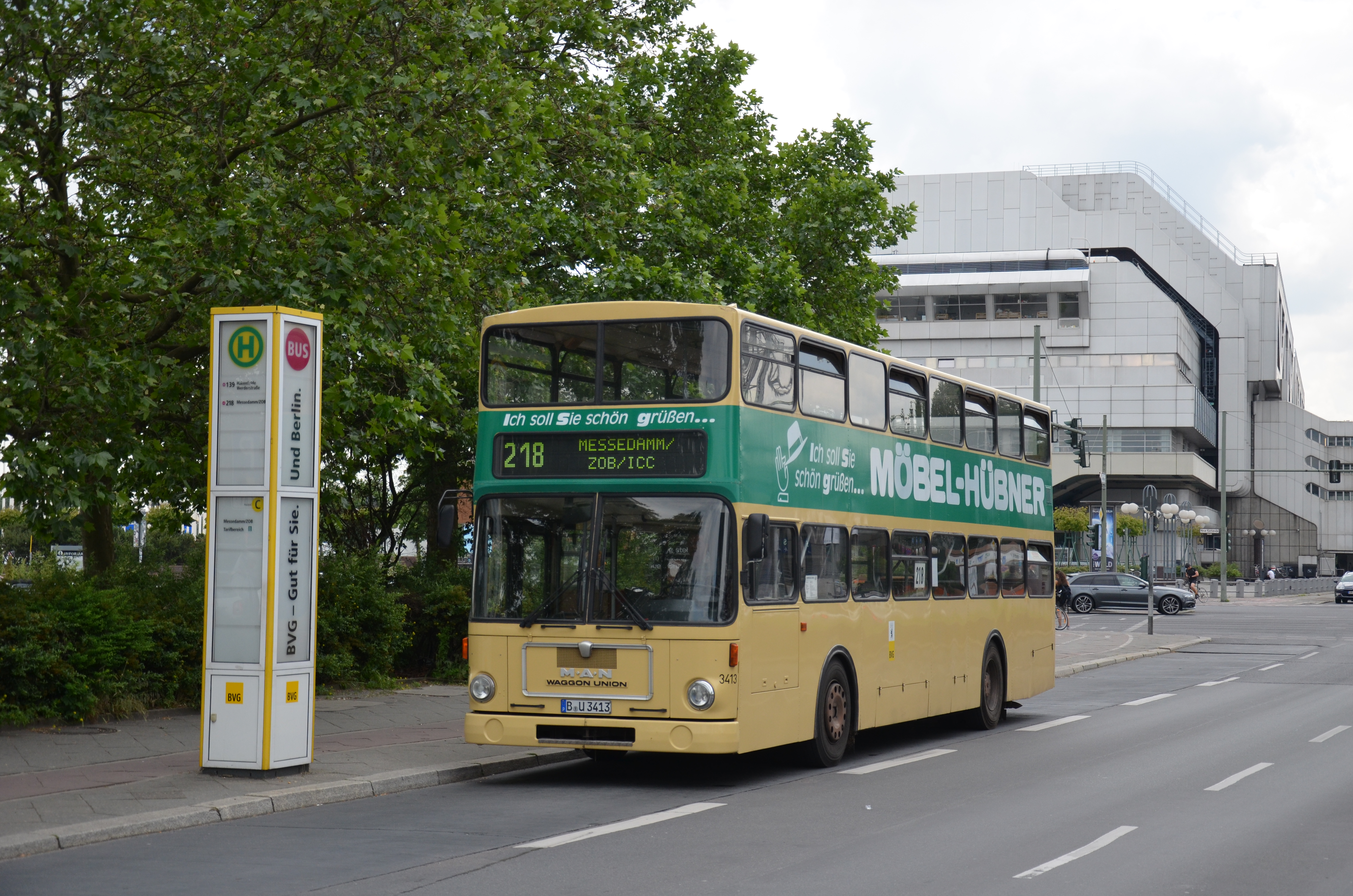 Autobus MAN SD 200 circulant sur la ligne 218, à S-Wannsee (Berlin).